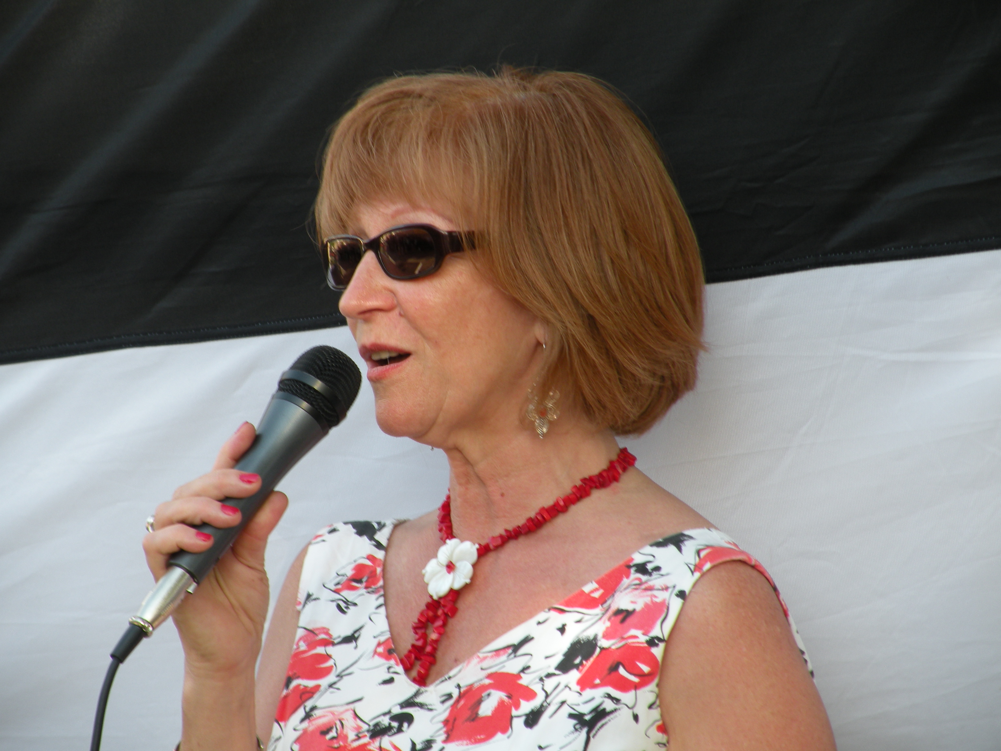 Lena Louarn da geñver fest Skol An Emsav e Roazhon, d’ar 25 a viz Mezheven 2010.